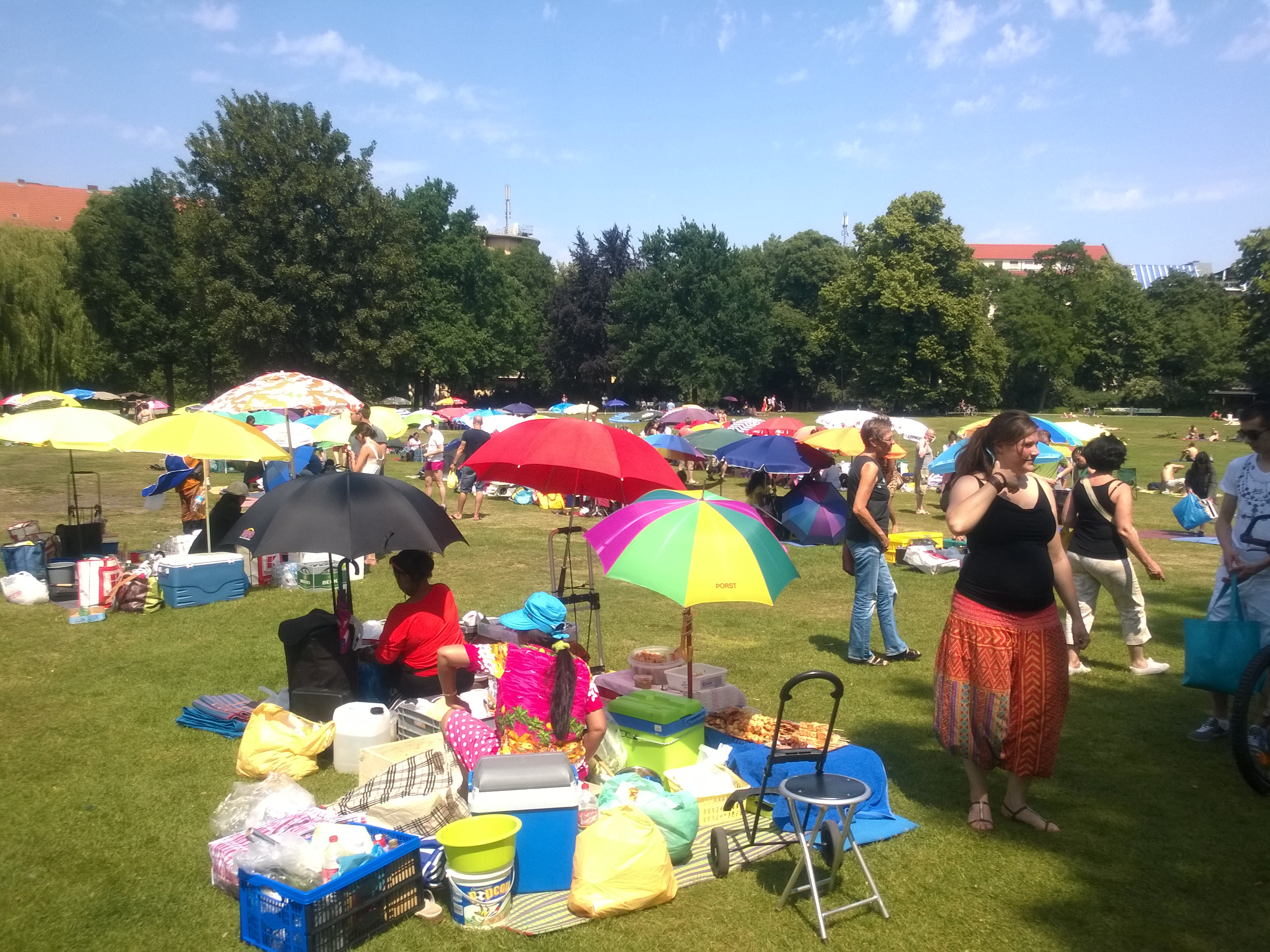 Berlin-Wilmersdorf Preußenpark asiatisches Picknick